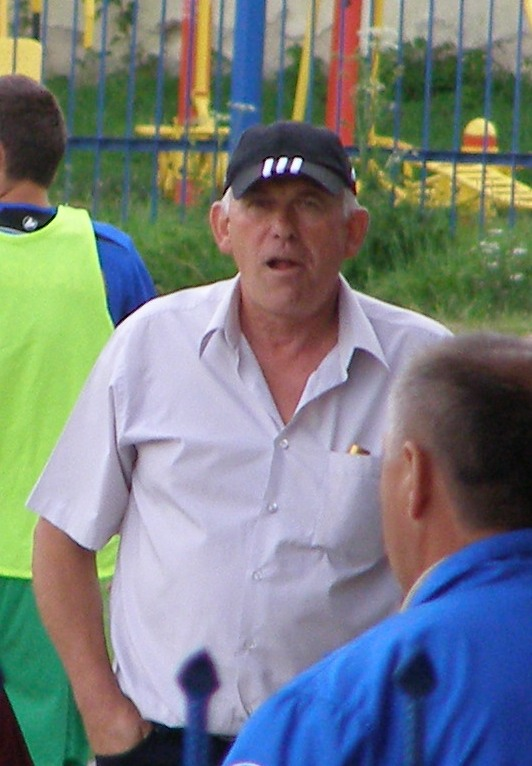 Петро Кушлик - радянський футболіст, український футбольний тренер